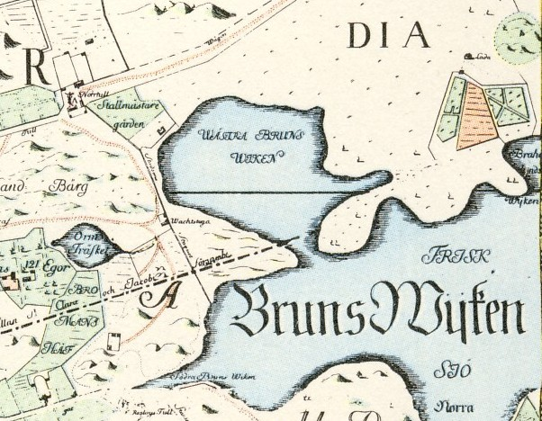 Del av Tillaeus' karta visande området söder om Brunnsviken, Stockholm